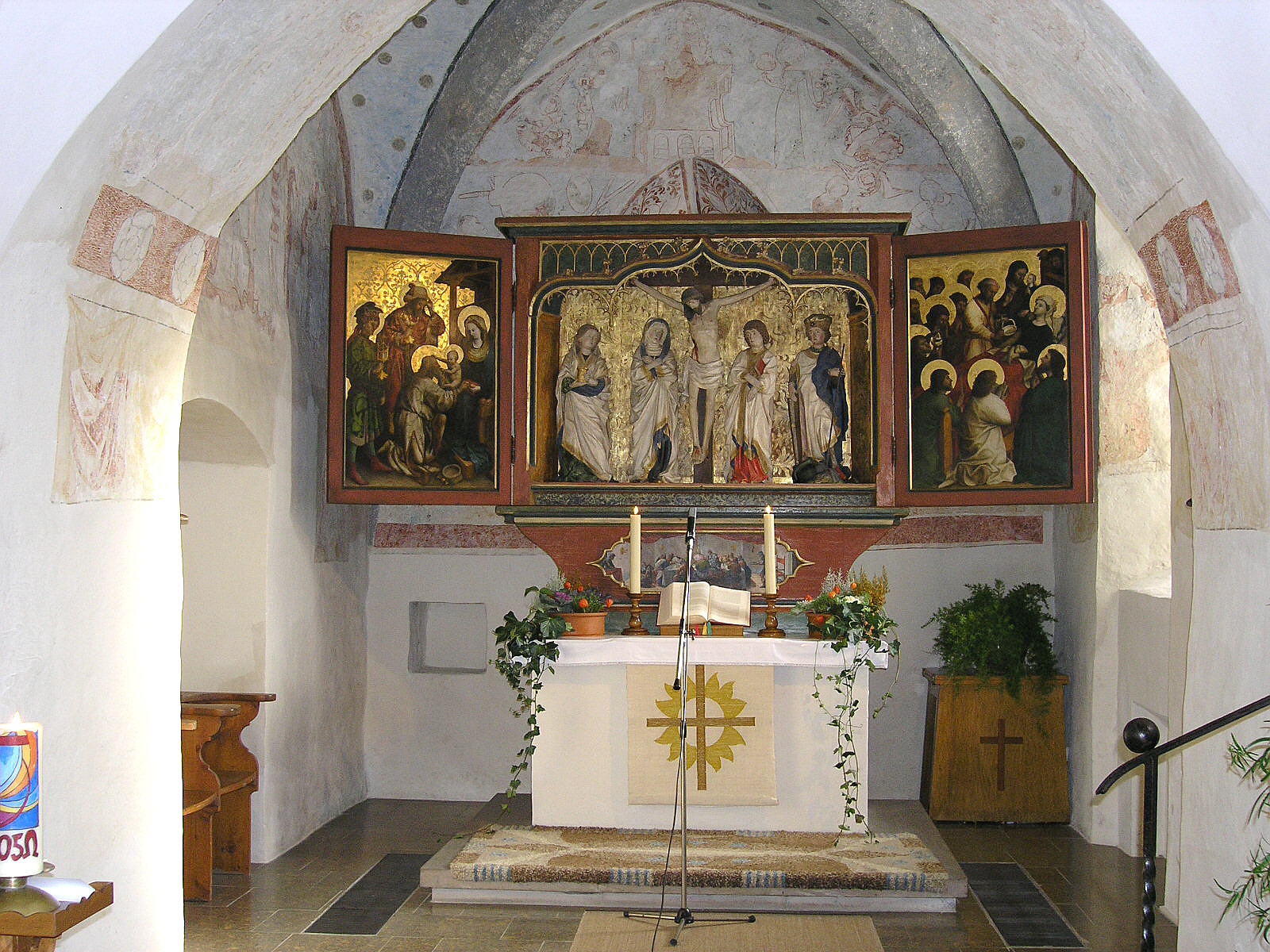 Der Flügelaltar in der Dorfkirche von Scharenstetten stand vor der Reformation im Ulmer Münster und ist der wichtigste noch intakt erhaltene Altar aus der Schule von Hans Multscher. Er entstand um das Jahr 1450.